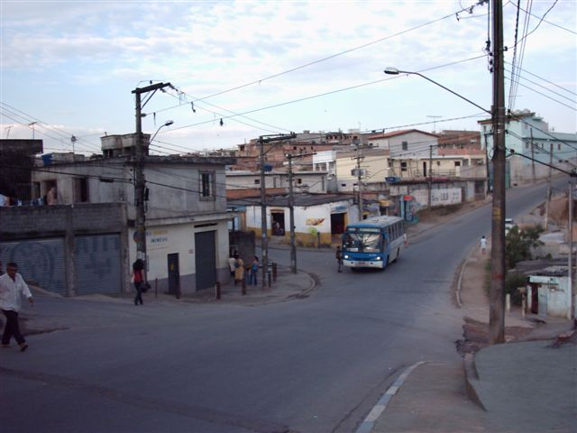 O Bairro Vila Natal no distrito do Grajaú, na cidade de São Paulo, Brasil